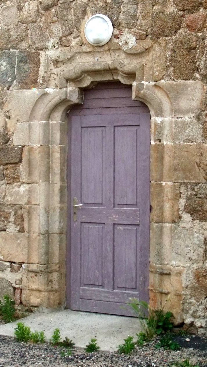 Monestier (Ardèche) porte château